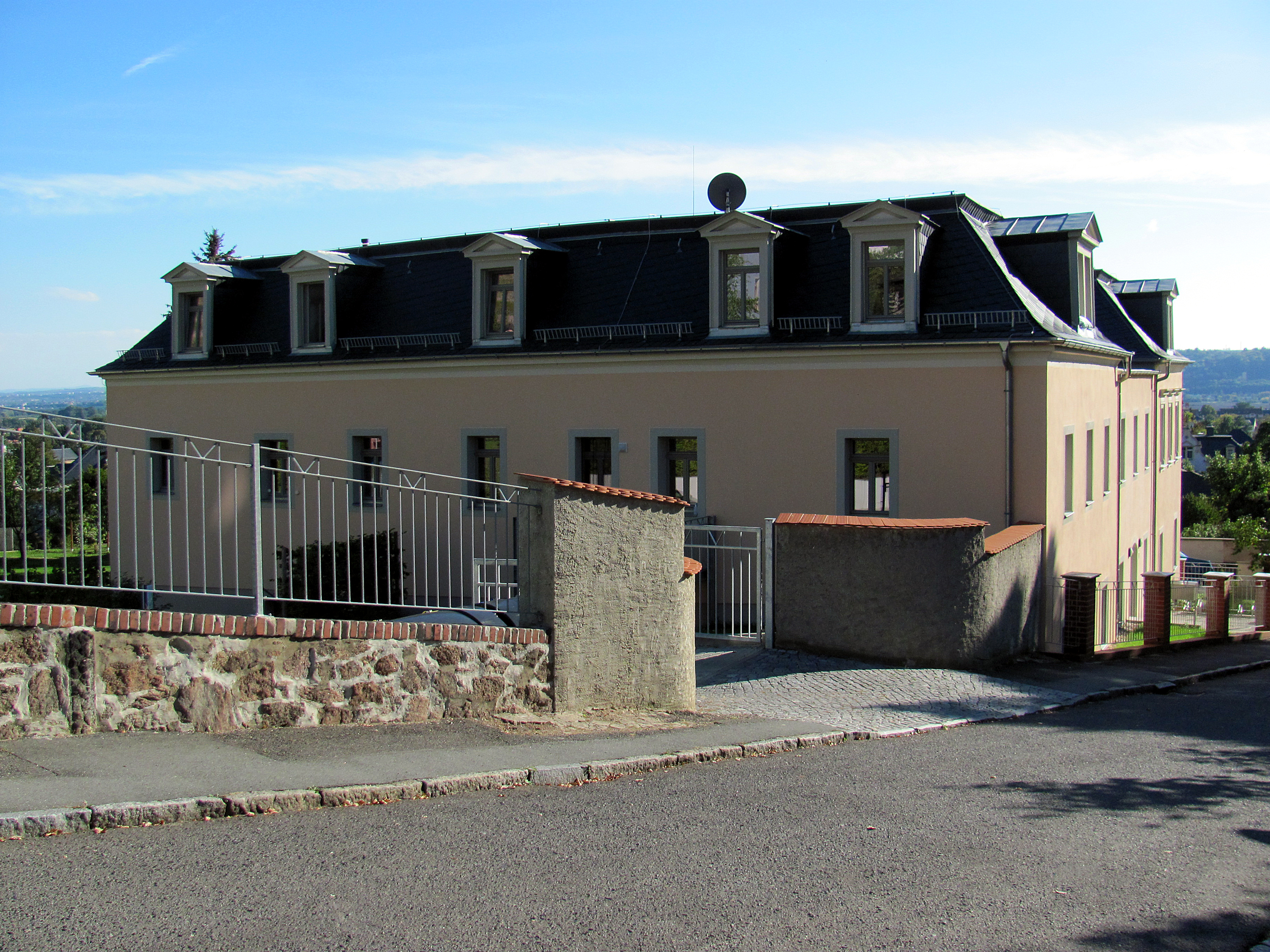 Radebeul, ehemaliges Badhotel Niederlößnitz